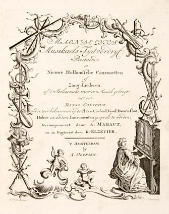 Title page of a published collection of Dutch songs by Belgian (?) born composer Antoine Mahaut. "Maendelyks musikaels tydverdryf; Bestaende in nieuwe Hollandsche canzonetten of zang-liederen. Op d'Italiaensche trant in 't musiek gebragt: met een Basso Continuo. Meede zeer bekwaem om op de clave-cimbael, viool, dwars-fluit, hoböe en andere instrumenten gespeelt te worden, gecomponeert d. A. Mahaut, en in digtmaat d. K. Elzevier. Amst., A. Olofsen, 1751-52."